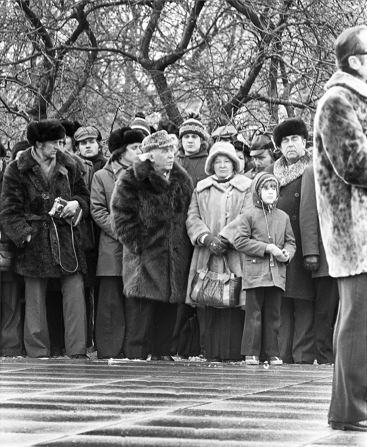 A. H. Tammsaare monumendi avamine 78 (09) Gustav Ernesaks